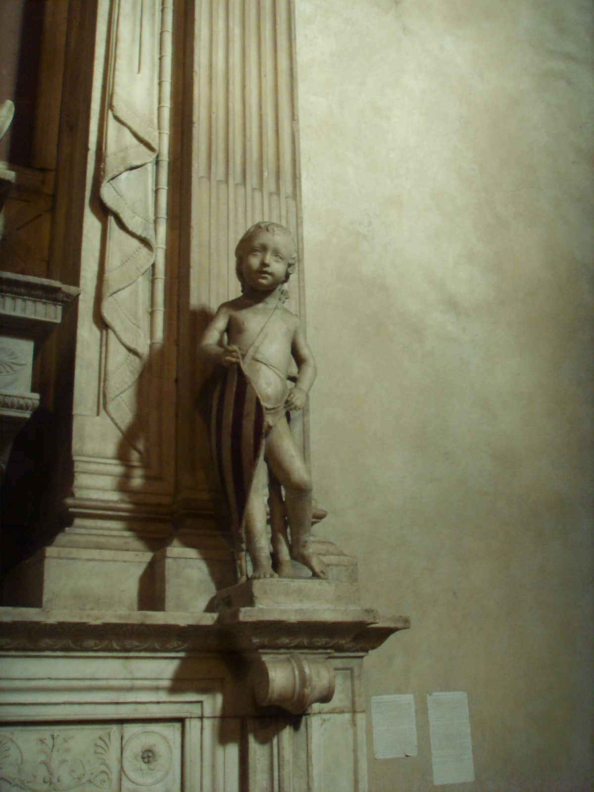 Badia_fiorentina,_tomba_ugo_di_toscana,_putto